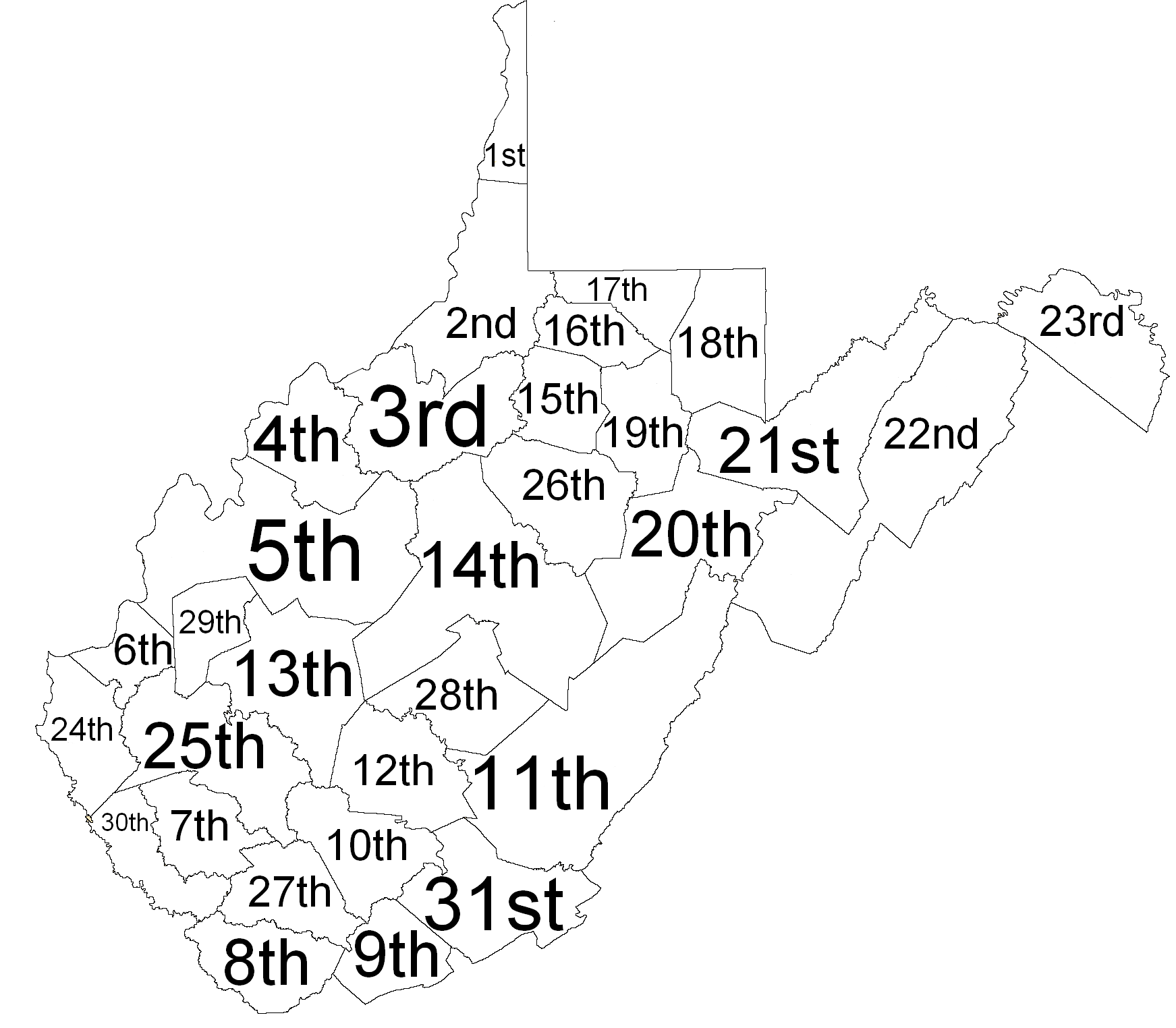 Map of West Virginia judicial circuits